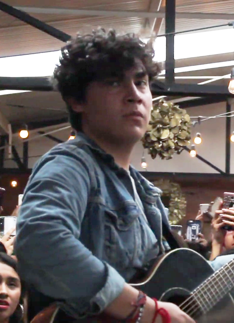 Ed Maverick